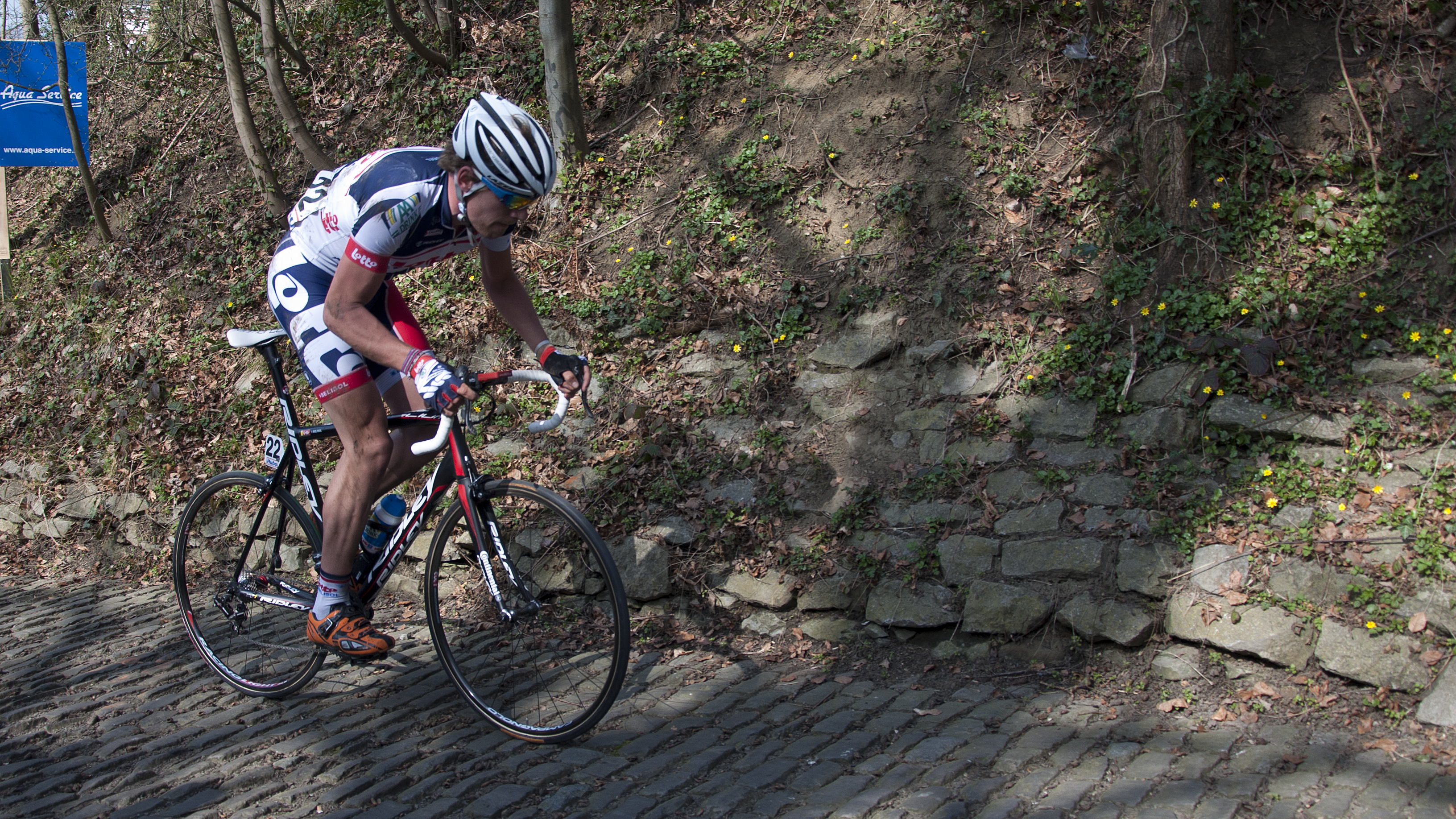 Sander Cordeel op de Muur van Geraardsbergen tijdens de E3 Harelbeke 2012